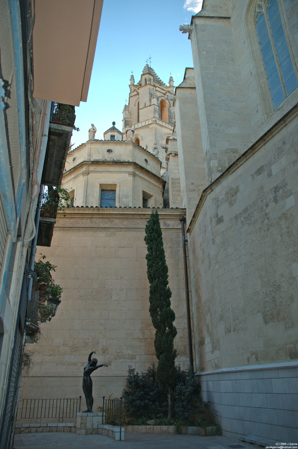 Prioral de Sant Pere de Reus, Baix Camp in Catalonia.